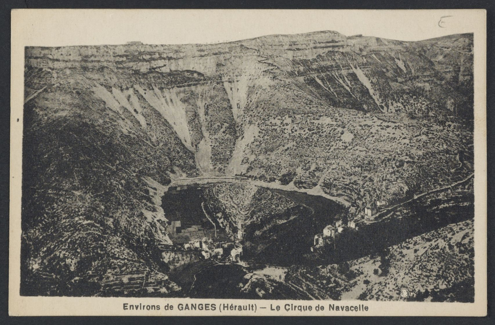 Saint-Maurice-Navacelles. - Le Cirque de Navacelle : carte postale.